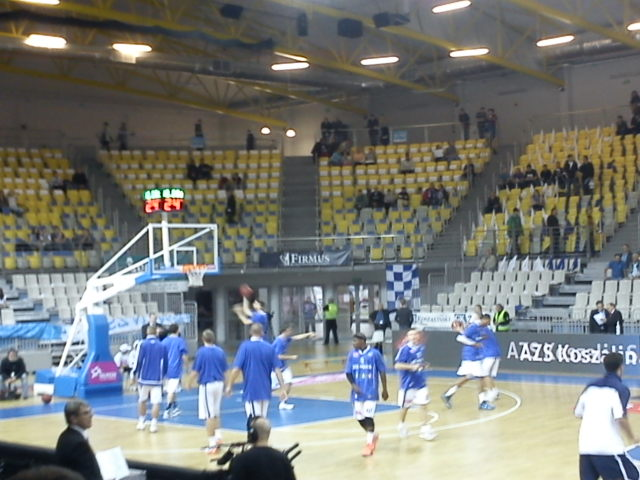 Rozgrzewka koszykarzy AZS Koszalin przed dmeczem z Asseco Prokom Gdynia w Tauron Basket Lidze, w Hali Widowiskowo-Sportowej w Koszalinie